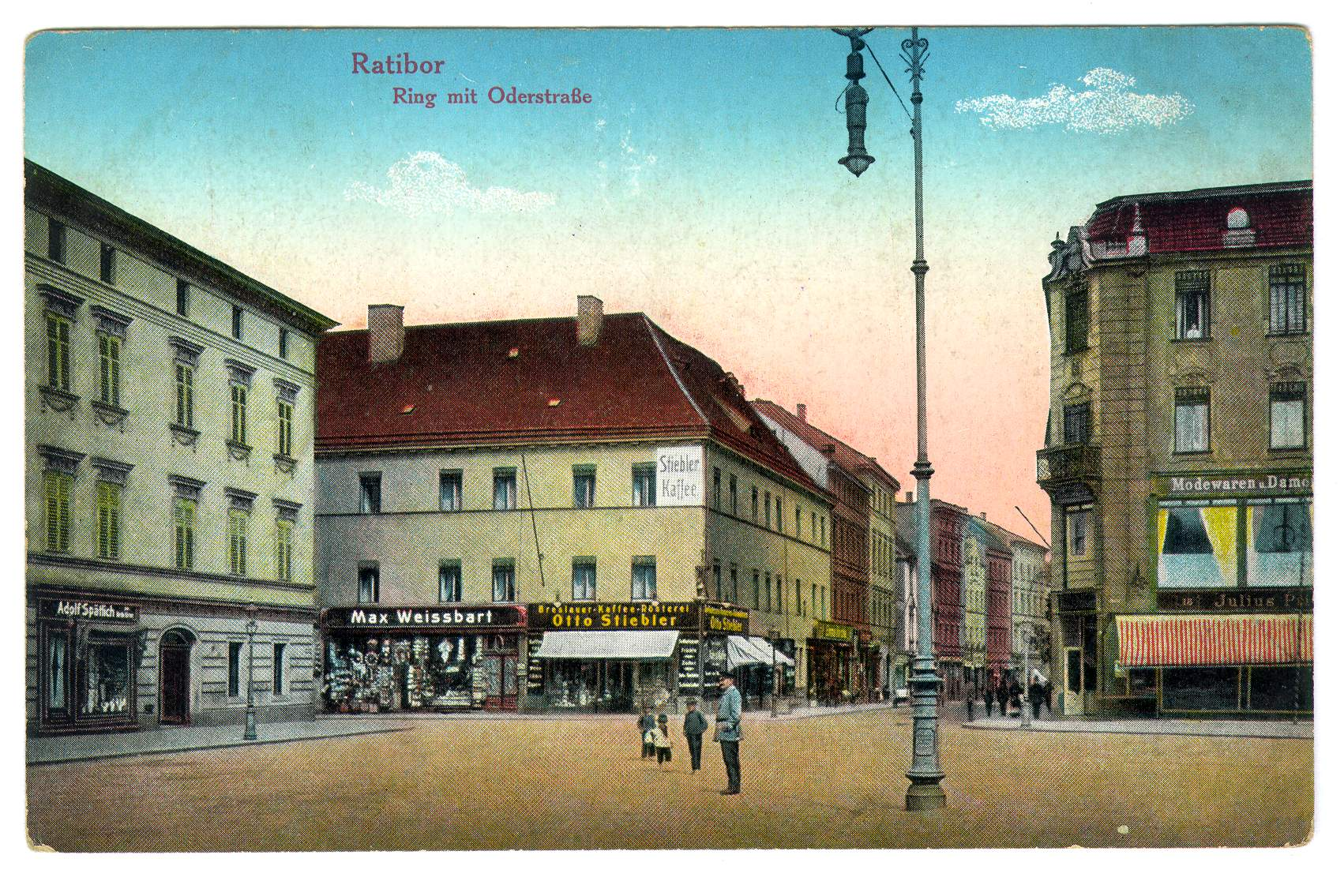 Raciborski rynek - ulica odrzańska, po lewej kamienica rodziny von Gaschin